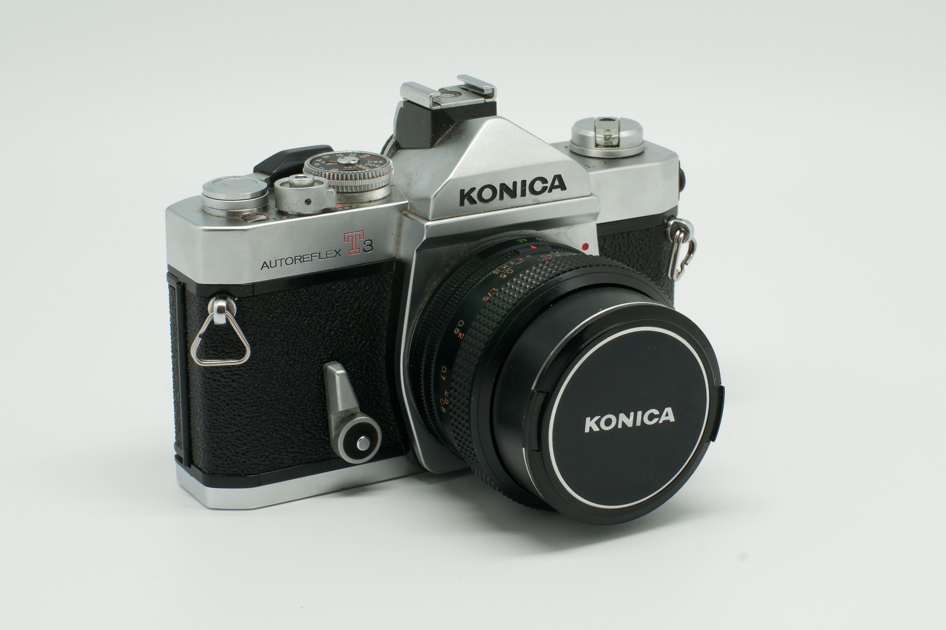 Konica - Autoreflex T3